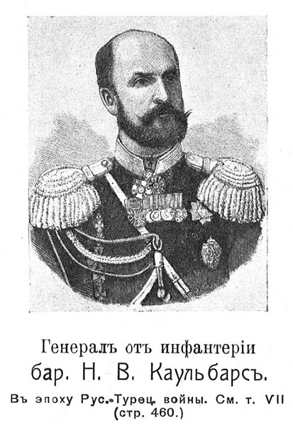 Барон Николай Васильевич Каульбарс. Это изображение было использовано для иллюстрирования статьи «Каульбарсы» опубликованной в двенадцатом томе «Военной энциклопедии», который был издан книгоиздательским товариществом И. Д. Сытина в 1913 году в столице Российской империи городе Санкт-Петербурге. Более подробное описание к этой картинке можно прочесть в указанной выше статье.